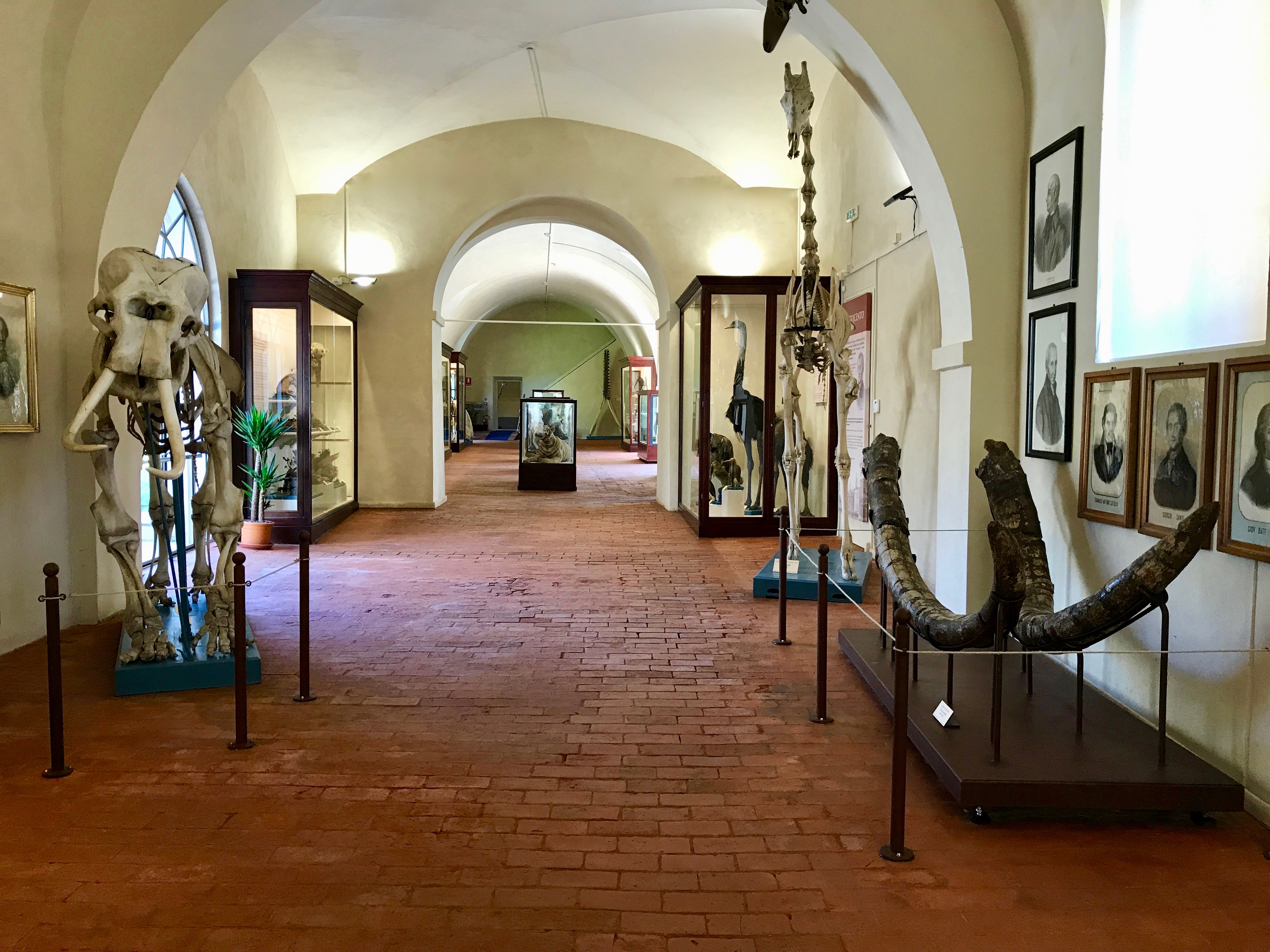 Vista generale della Galleria storica del museo di storia naturale dell'Università di Pisa. Si notano sulla destra una coppia di difese di Mammuthus meridionalis, uno scheletro di Giraffa camelopardalis (giraffa) e sulla sinistra quello di Elephas maximus (elefante asiatico)